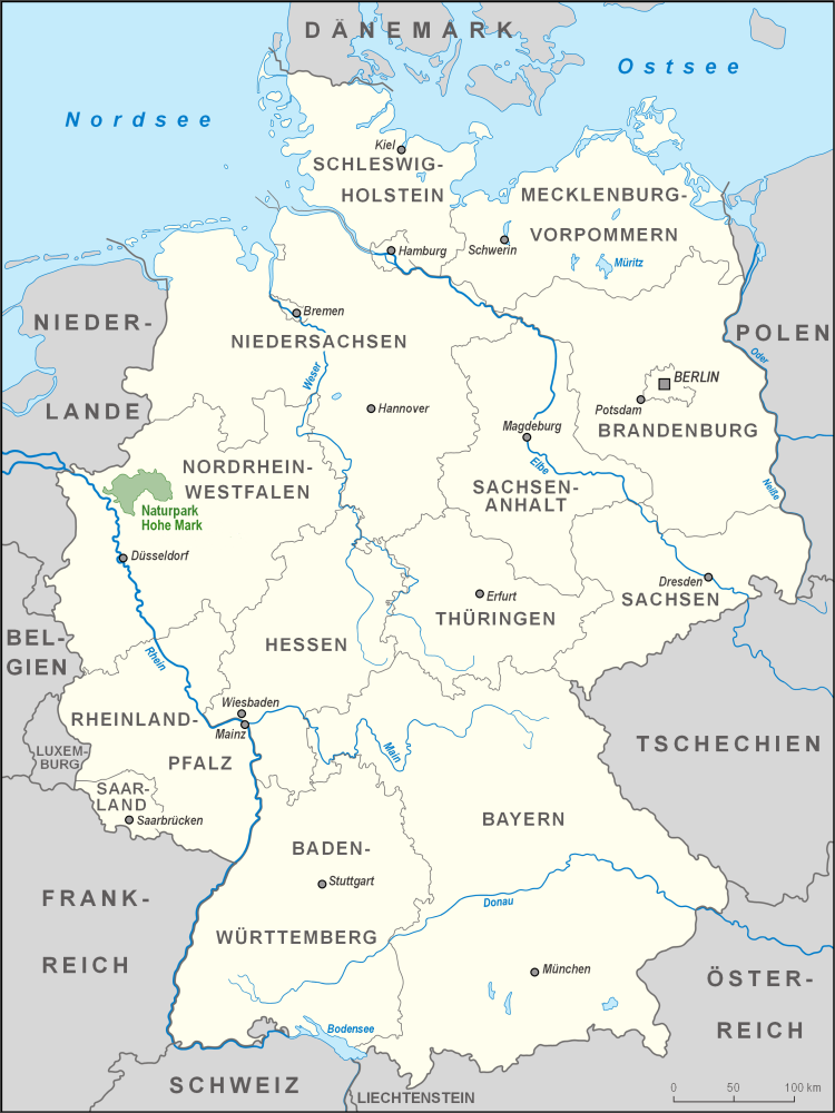 Karte des Naturparks Hohe Mark in Deutschland